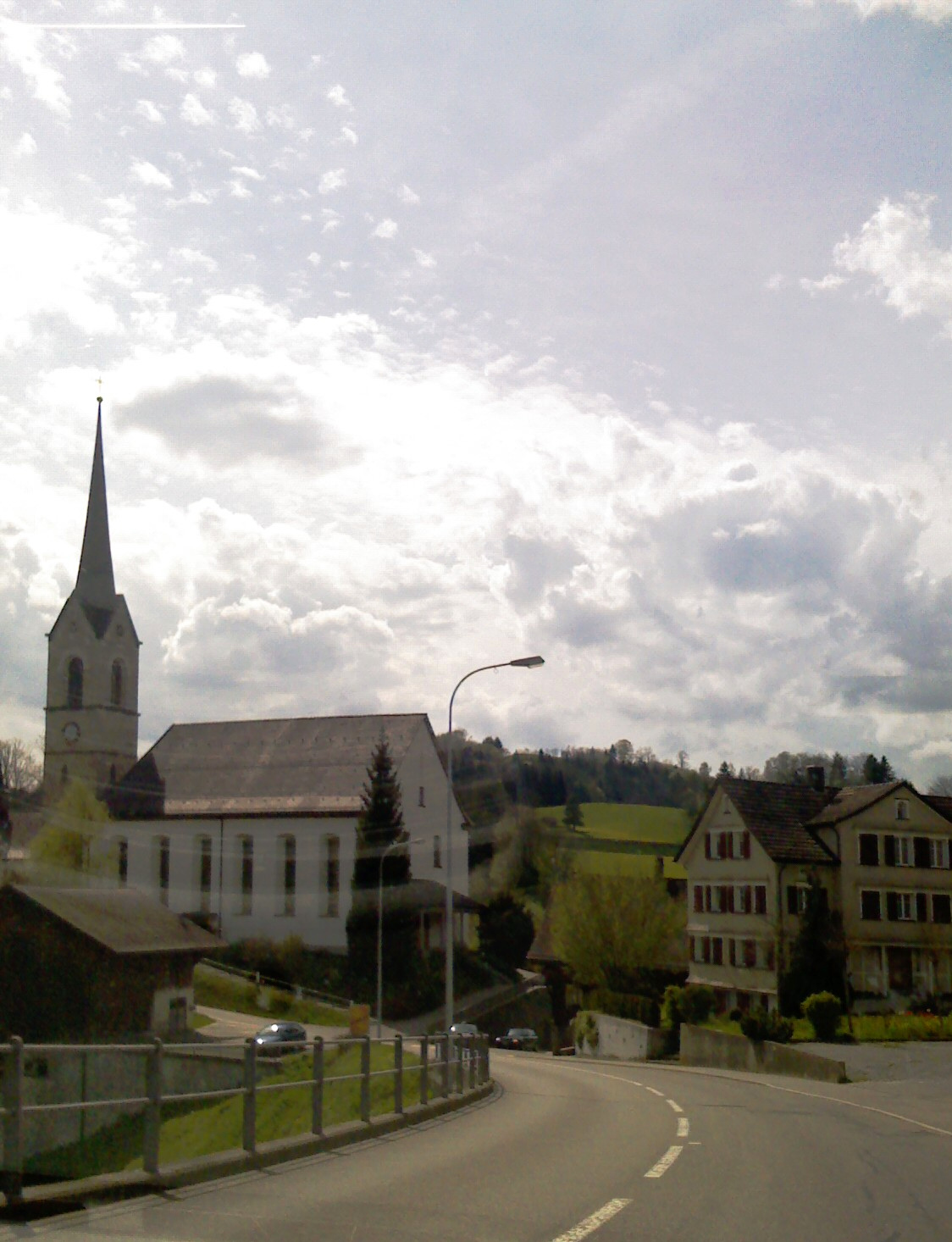 Lütisburg, Catholic church, Toggenburg, Switzerland - Lütisburg en Togenburgo, katolika preĝejo, Svislando